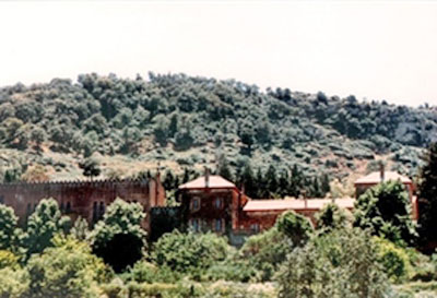 photo du monastere de tibhirine